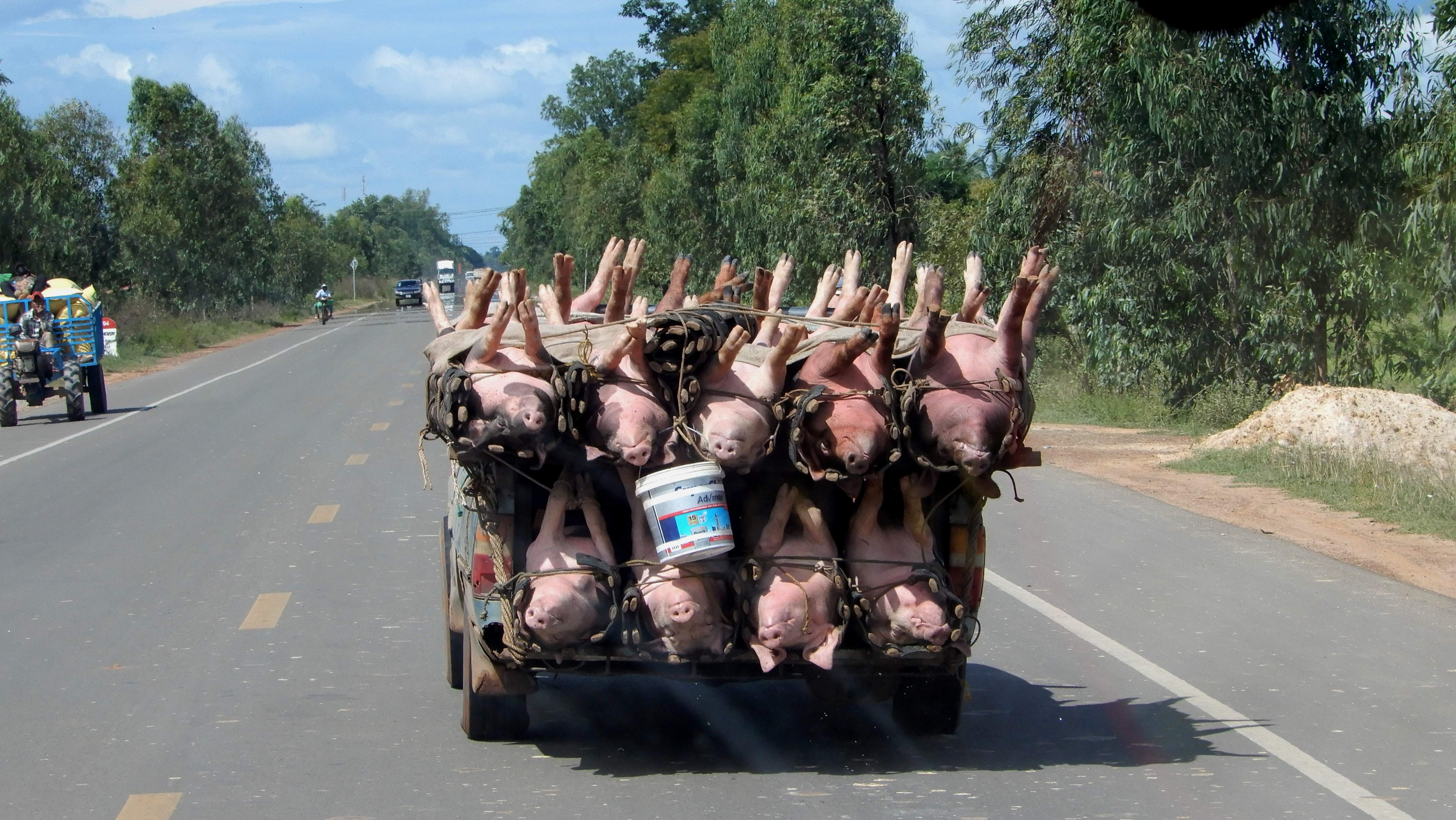 Kambodscha, Transport lebender Schweine Richtung Siem Reap